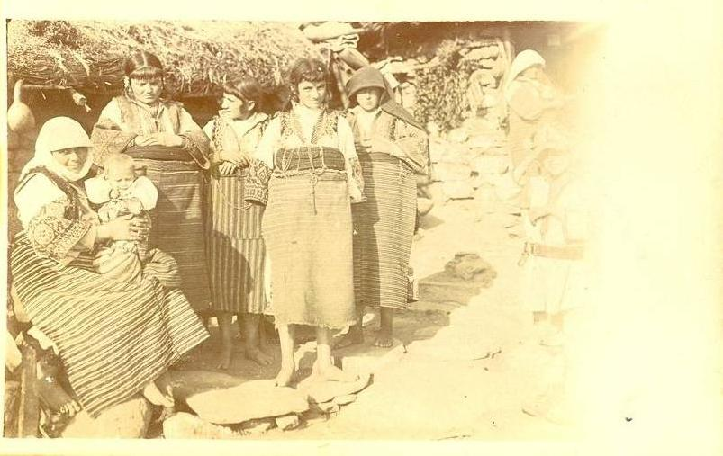 Селянки в Сакулево